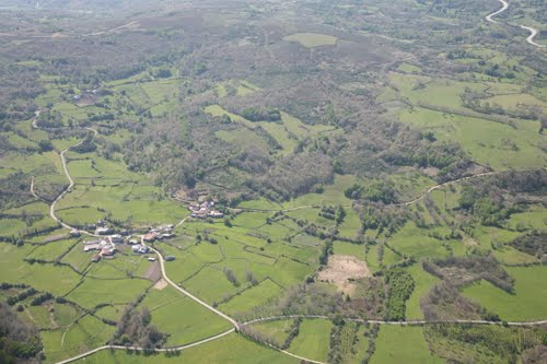 Vista de San Silvestre, concello de San Xoán de Río (Ourense).